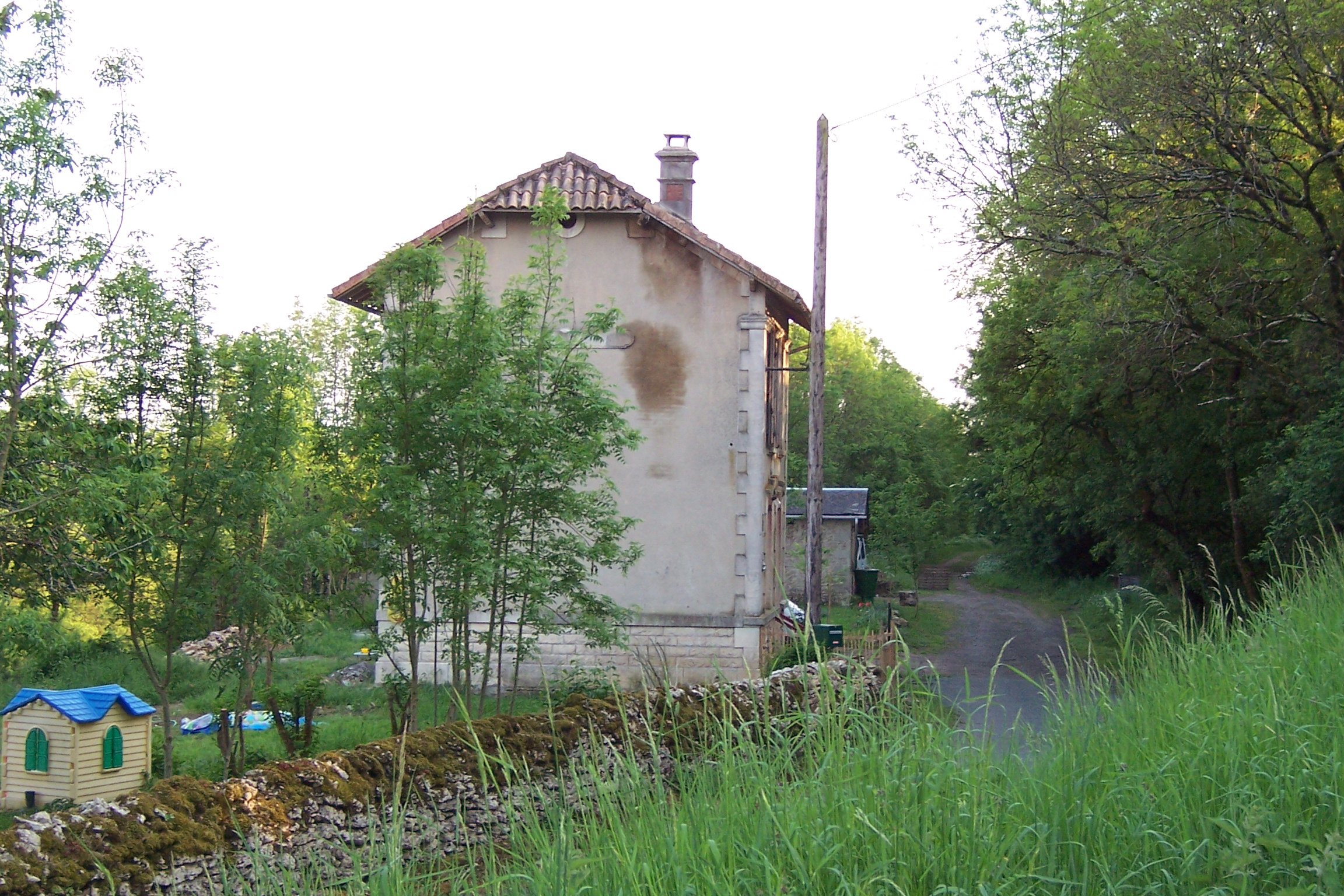 France - Deux-Sèvres - Augé - Ancienne gare TDS